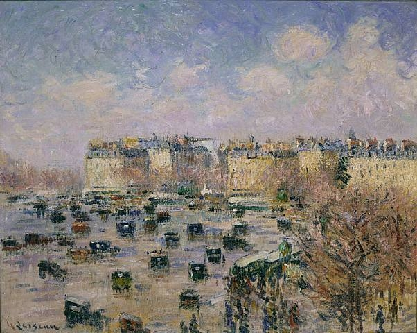 Gustave Loiseau : Paris, Place de l'Etoile, Avenue Wagram (1929 ou 1930, huile sur toile)